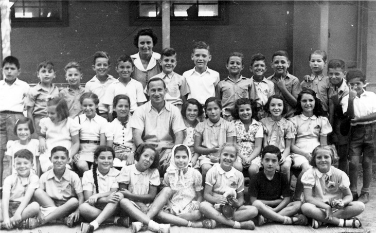 תלמידי המכינה תש"ה עם עמנואל יפה; 1945 - ביהס הריאלי